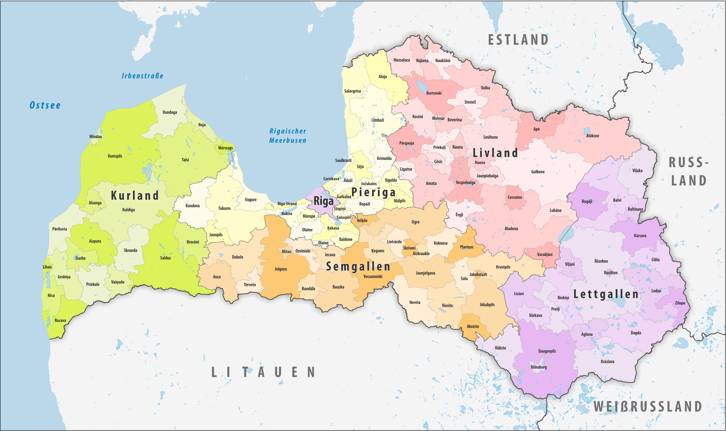 Politische Gliederung Lettlands